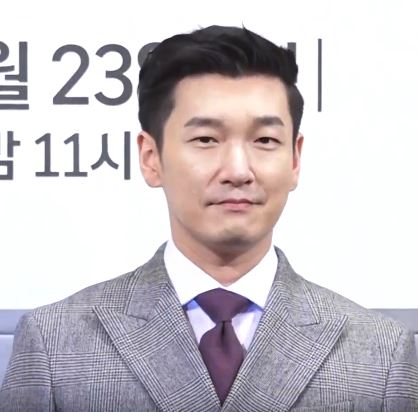 [제작발표회] 부드러운 눈빛